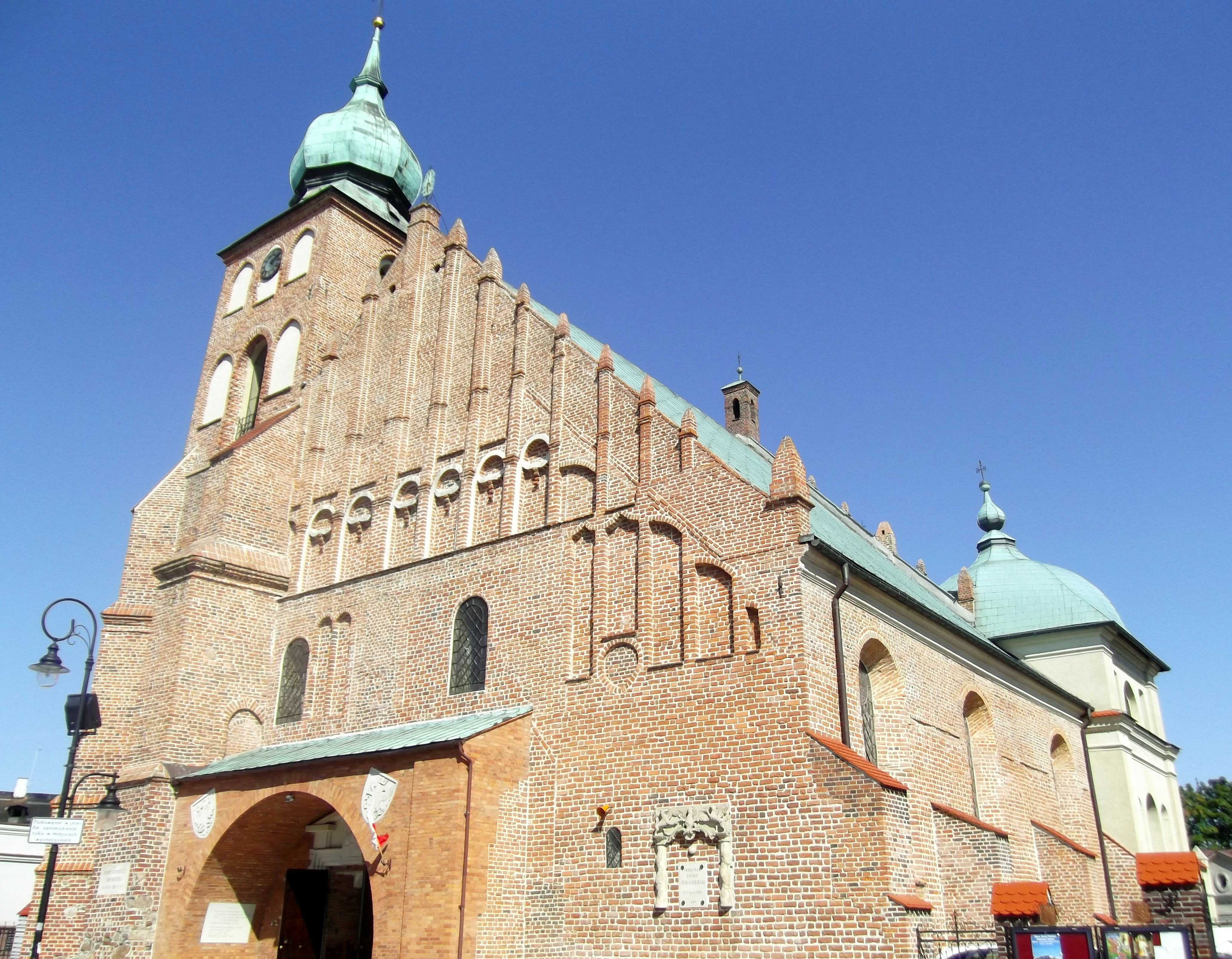 Sieradz, kościół farny Wszystkich Świętych, 1370, 1580-1585, 1648-1682, XVIII